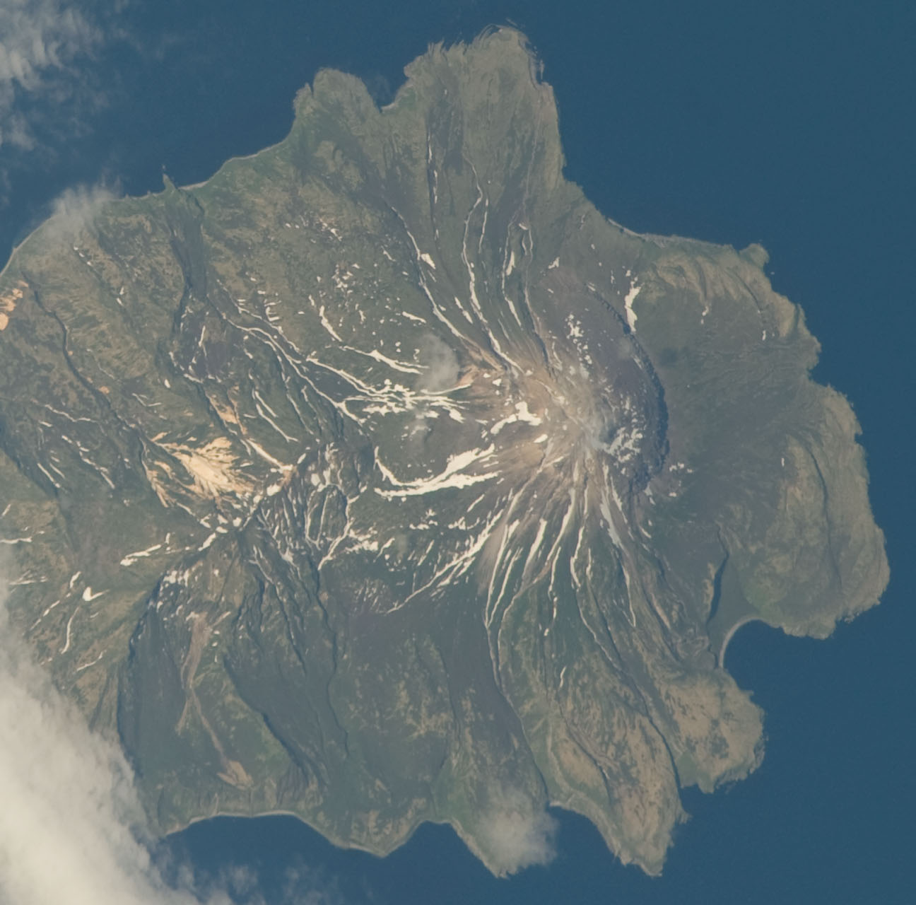 Вулкан Экарма. Снимок с МКС. Фрагмент